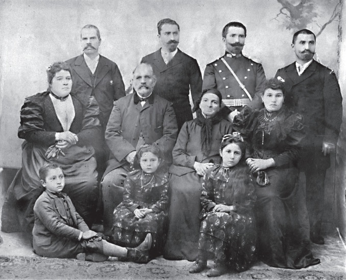 Седнали - в средата Никола Станев - Шарапчията и съпругата му София. В ляво и дясно - дъщерите им Мария и Тонка. Прави - Георги Данев - съпруг на Мария, Петър Винаров, Върбан Винаров и Петър Хаджииванов. Децата на Петър и Тонка - Иван, Райна и Софка.